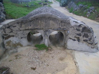 早期為風水寶地的澎湖縣吉貝嶼龍喉，有大量水源供應